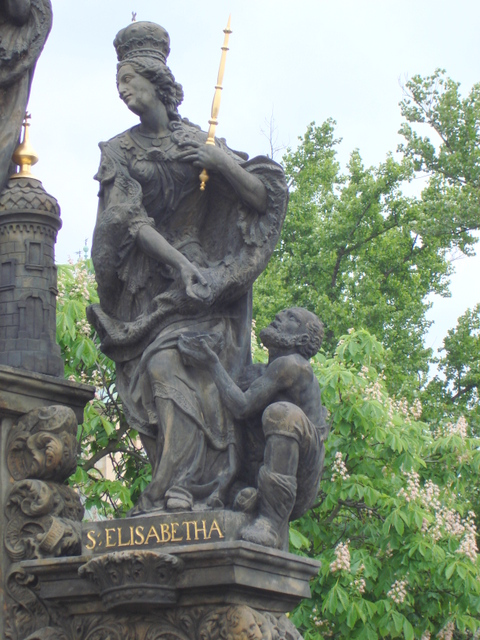 Praga, most Karola, figura św. Elżbiety z Turyngii